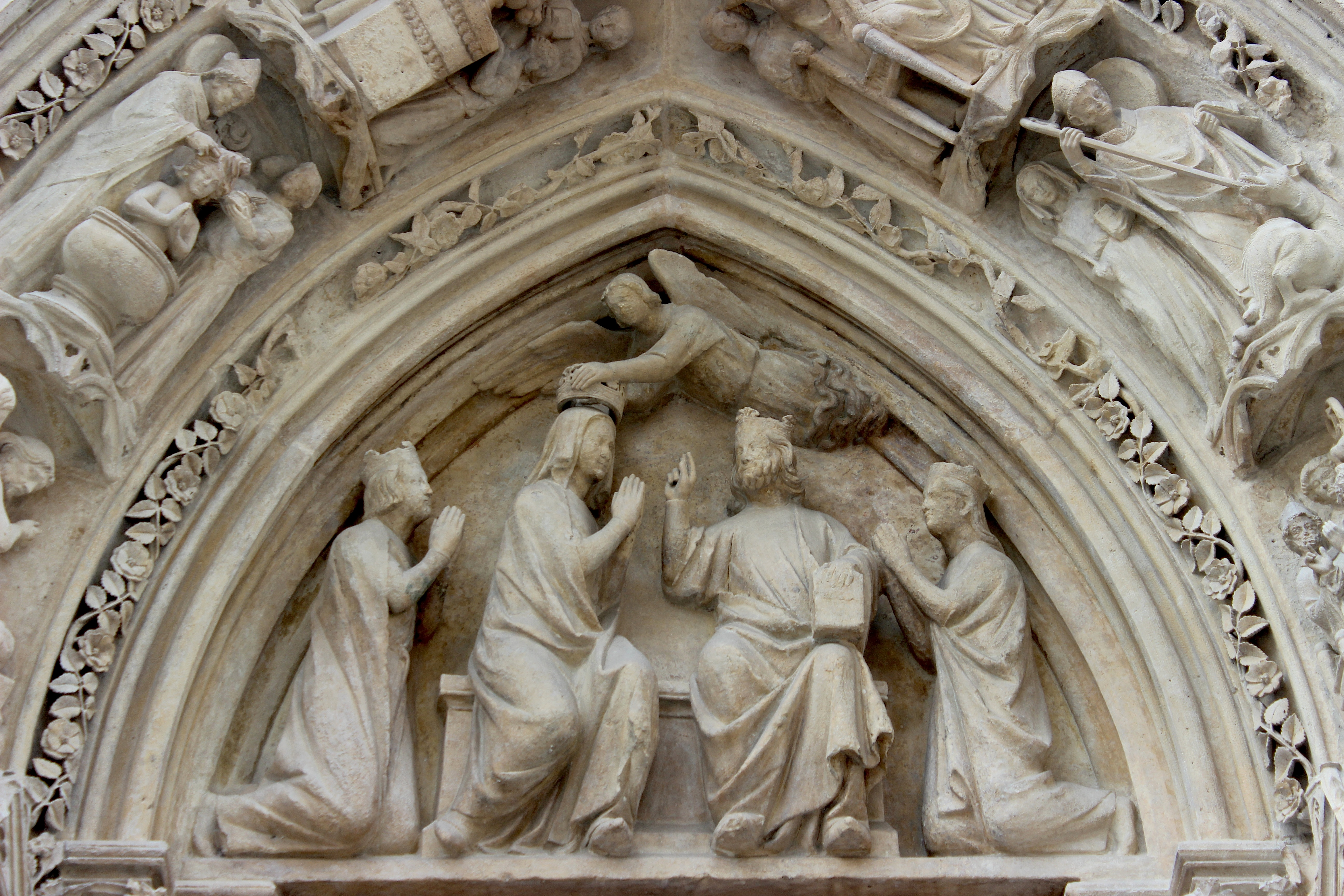 París. Notre Dame. Puerta roja.